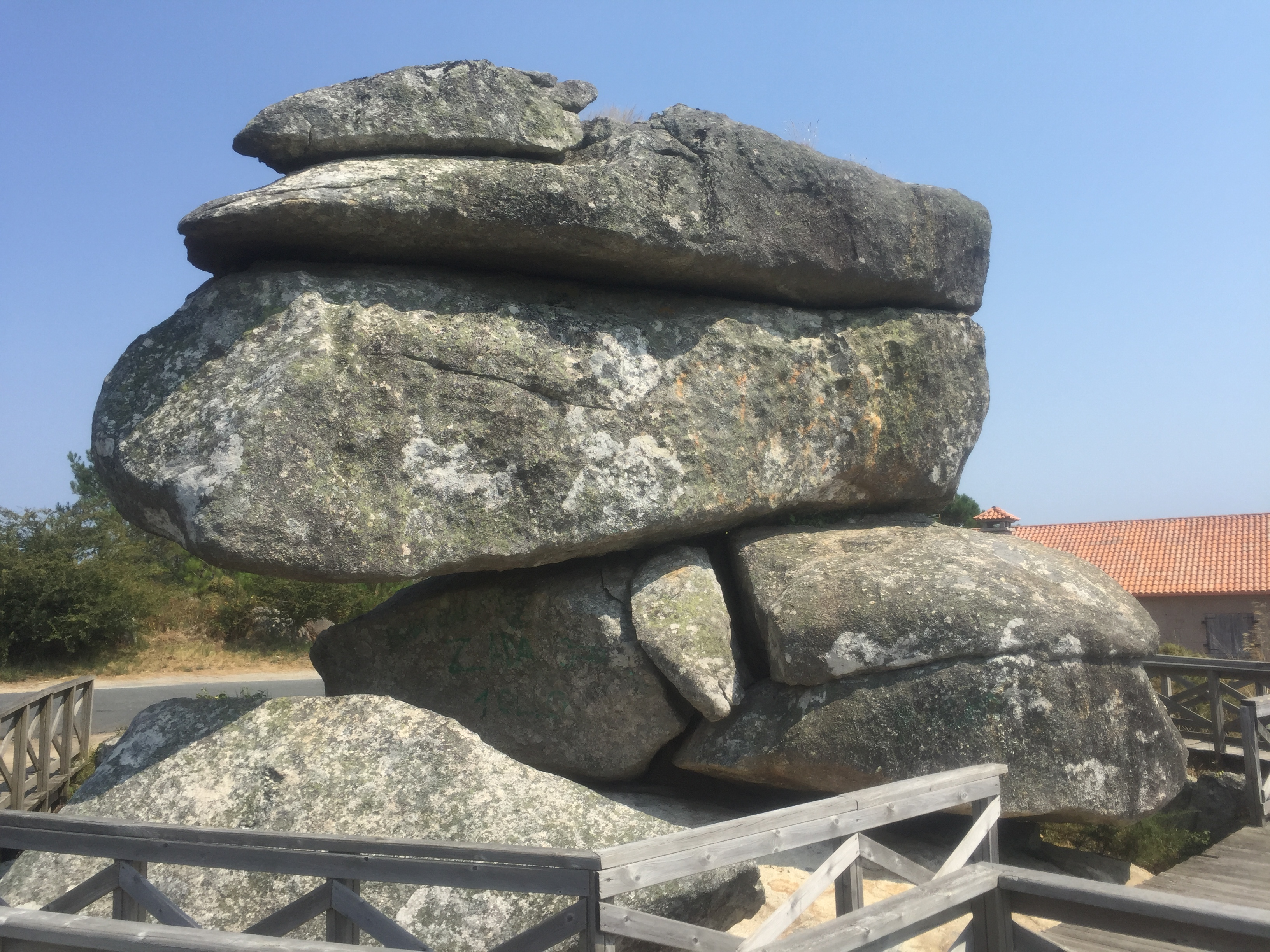 Piedra caballera en la cima del Monte Siradella (O Grove).